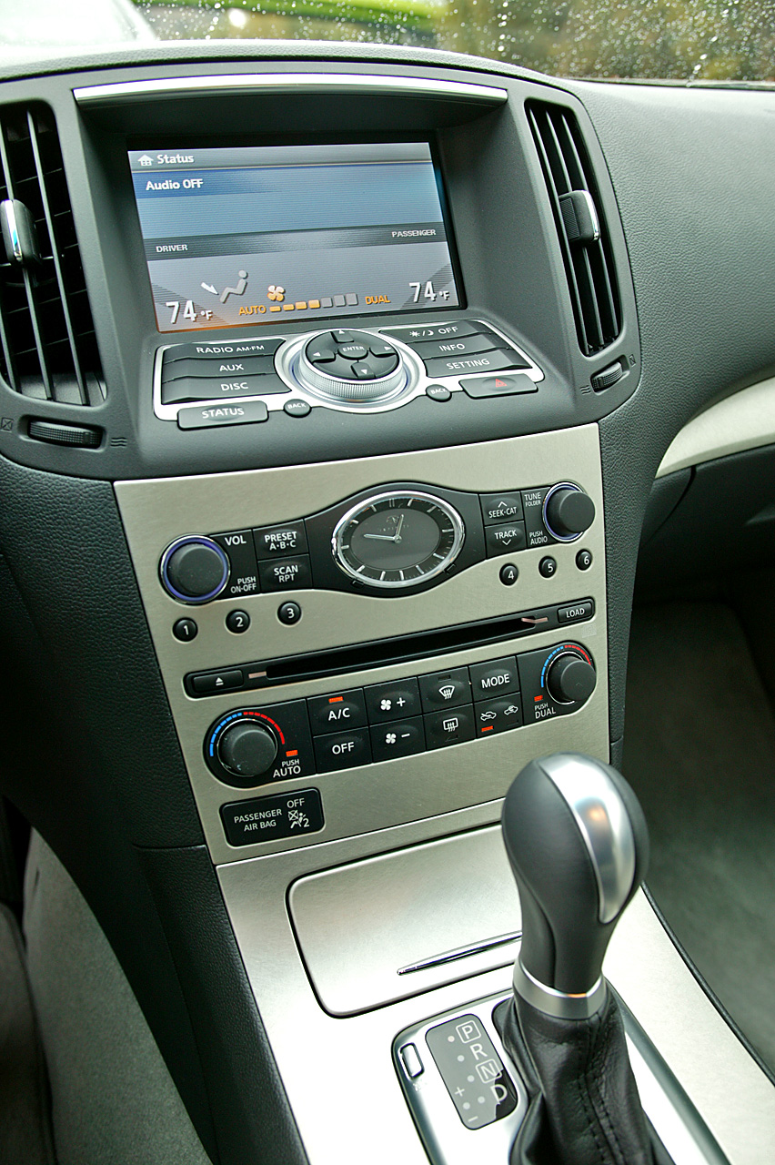 '07 Infiniti G35